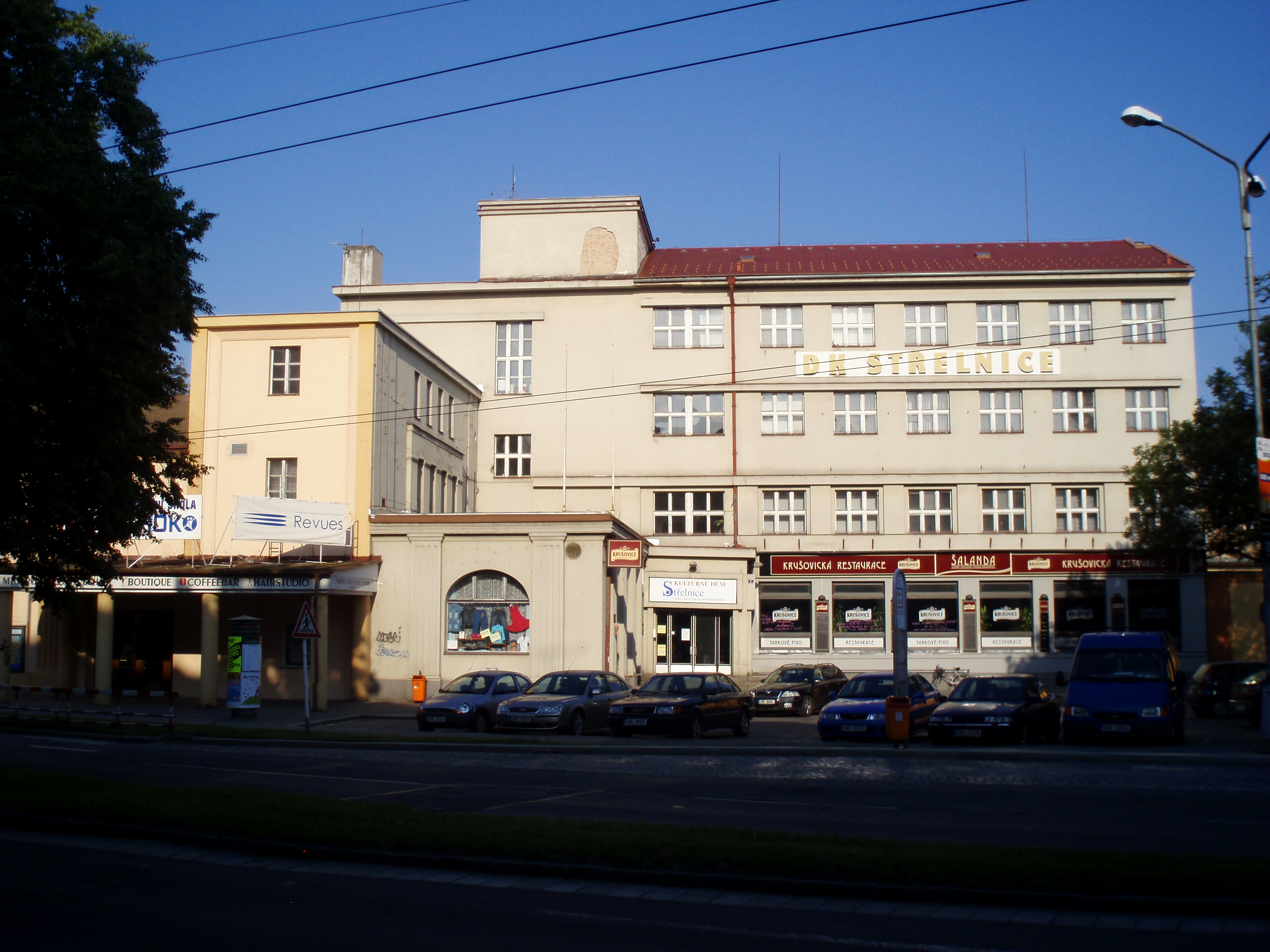 KD Střelnice (Hradec Králové)